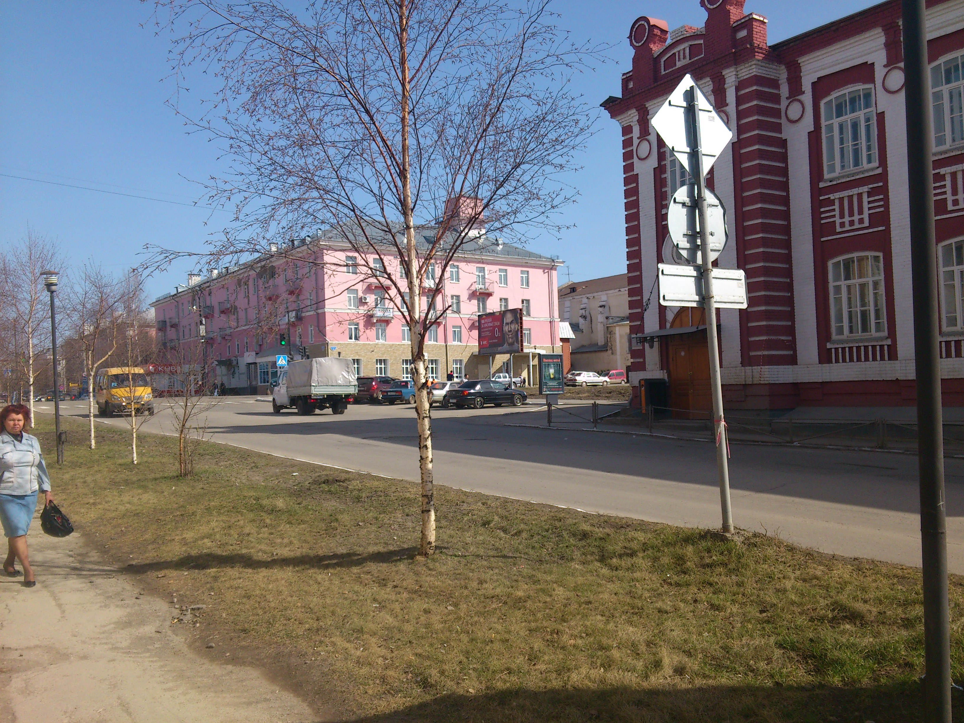 Лысьва, весна.